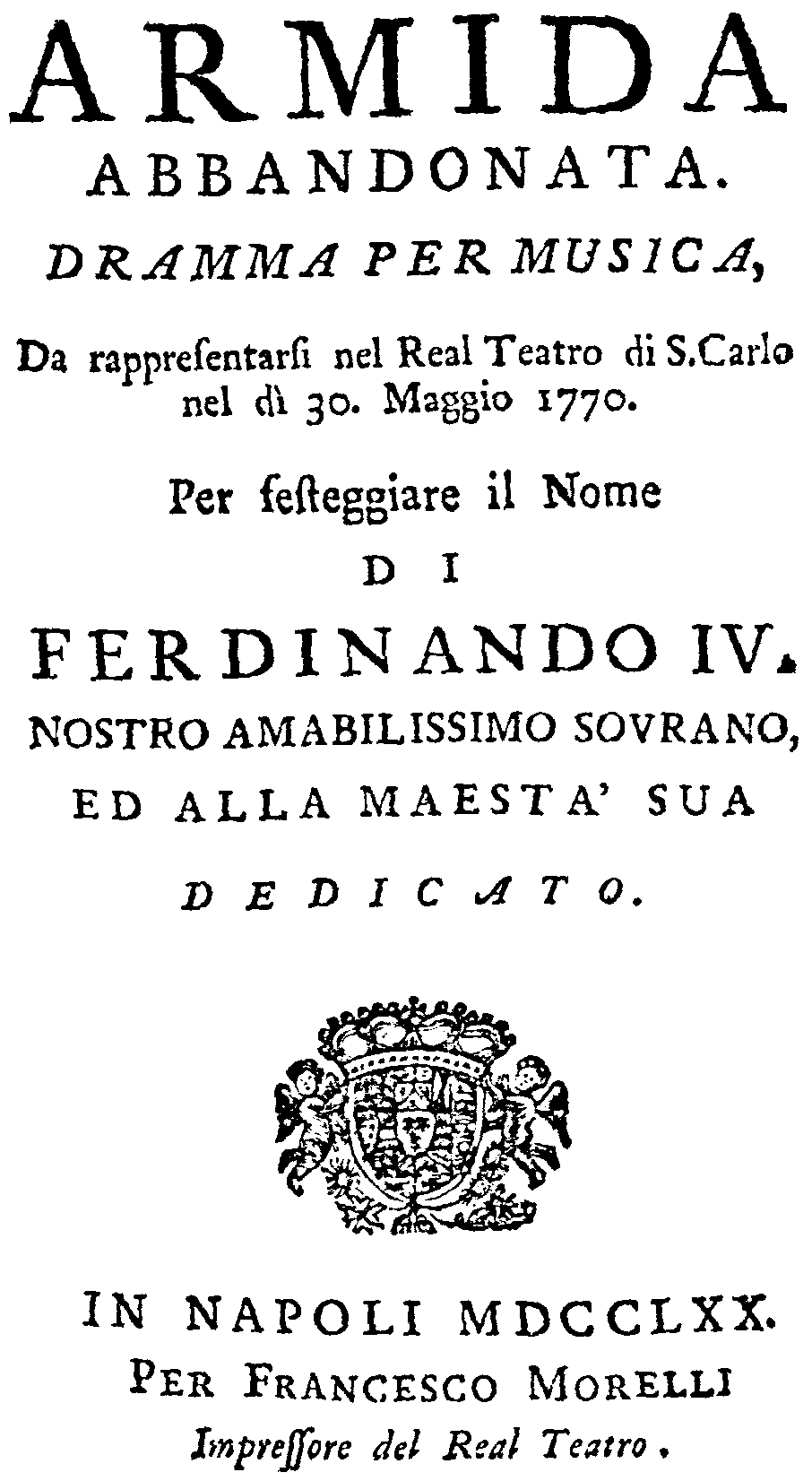 Jommelli - Armida abbandonata - title page of the libretto - Naples 1770